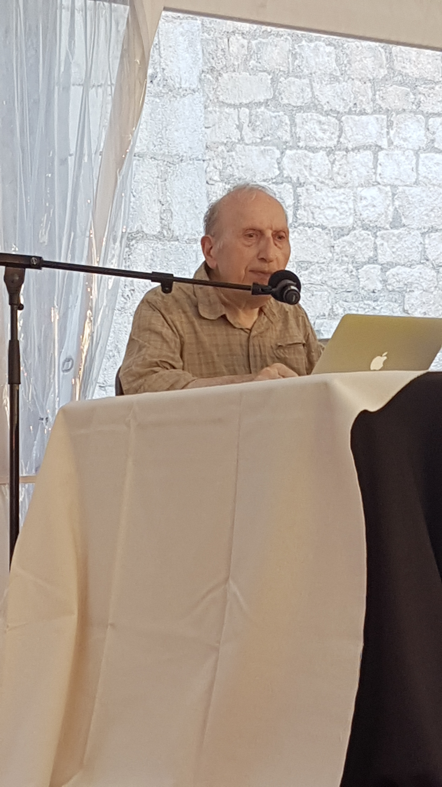 Jean-Claude Milner à Lagrasse en 2019